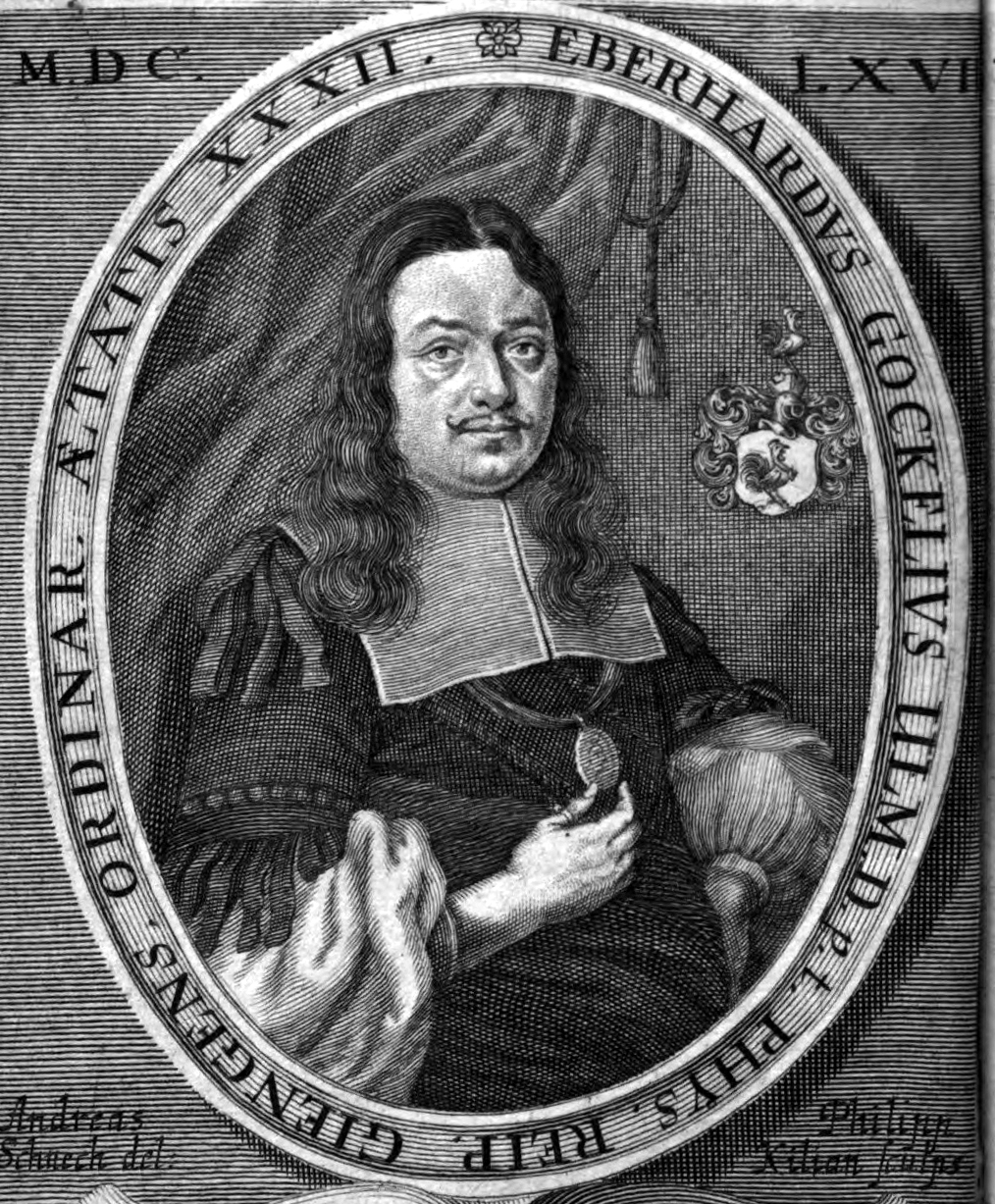 Portrait Eberhard Gockel